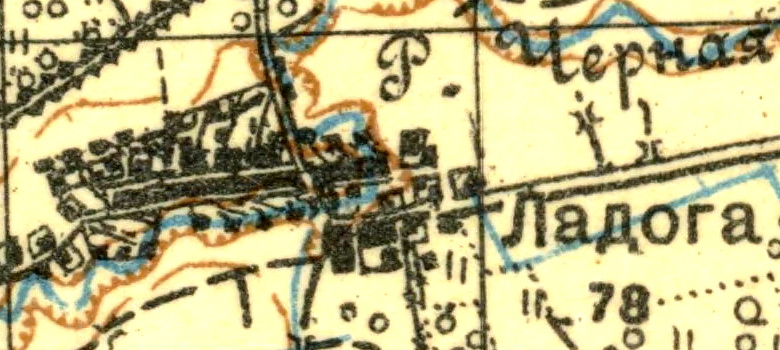 Топографическая карта Ленинградской области, квадрат О-36-14-А (п. Фёдоровский), деревня Ладога